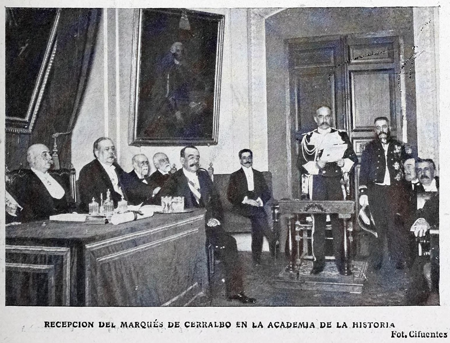 En la Academia de la Historia se celebró el domingo la recepción del marqués de Cerralbo con gran solemnidad. Todos los académicos y un escogidísimo público asistieron al acto, y celebraron su discurso, que versó sobre el tema El arzobispo D. Rodrigo Ximénez de Rada y el monasterio de Santa María de Huerta, profundo y completo estudio histórico en el que lució el ilustre académico sus conocimientos, é hizo gala en poética y castiza forma de sus convicciones religiosas y sus aficiones artísticas. Contestó al nuevo académico don Juan Catalina y García, cuyo discurso fue también muy aplaudido.